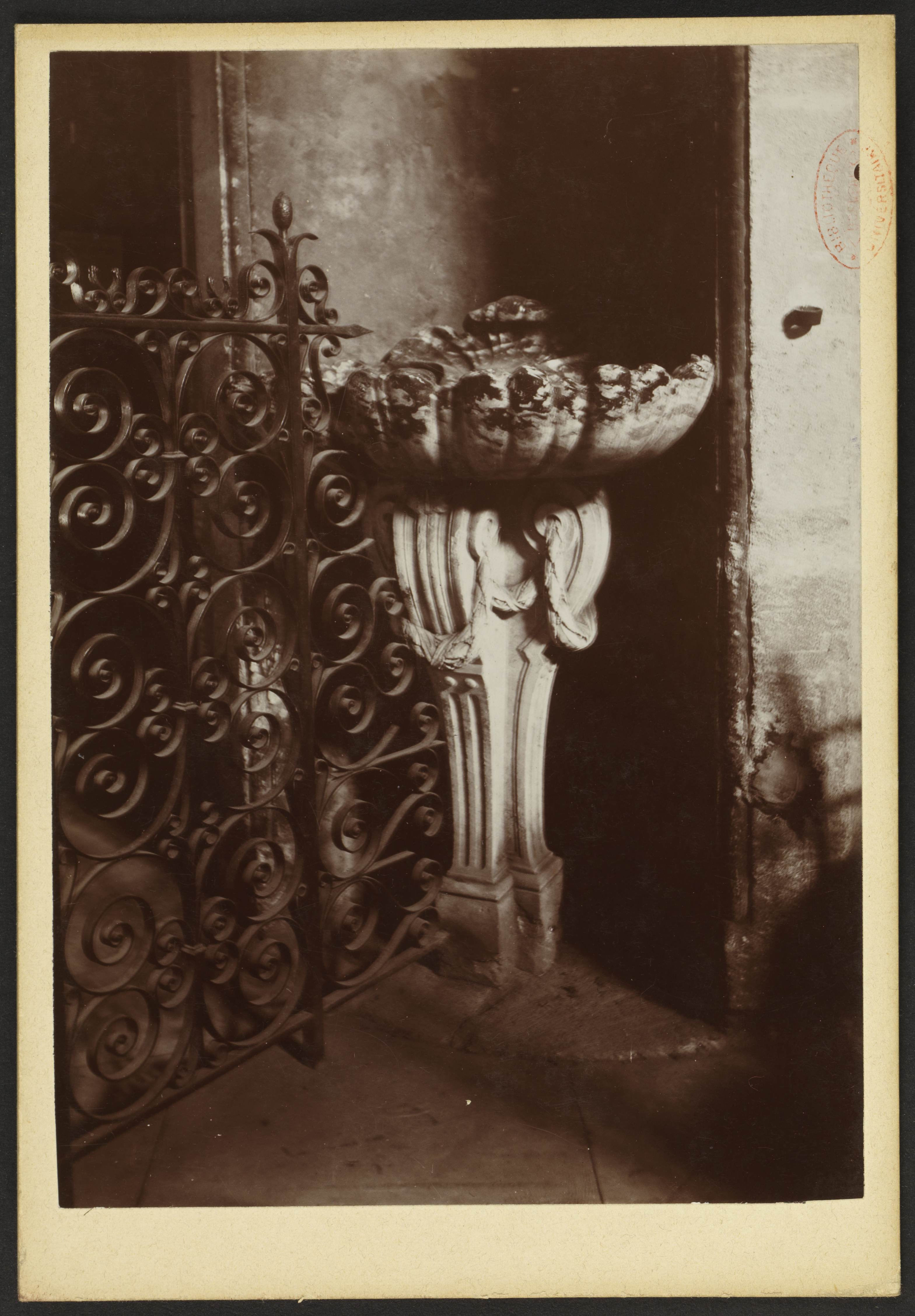 Basilique Saint-Seurin de Bordeaux; Bénitier